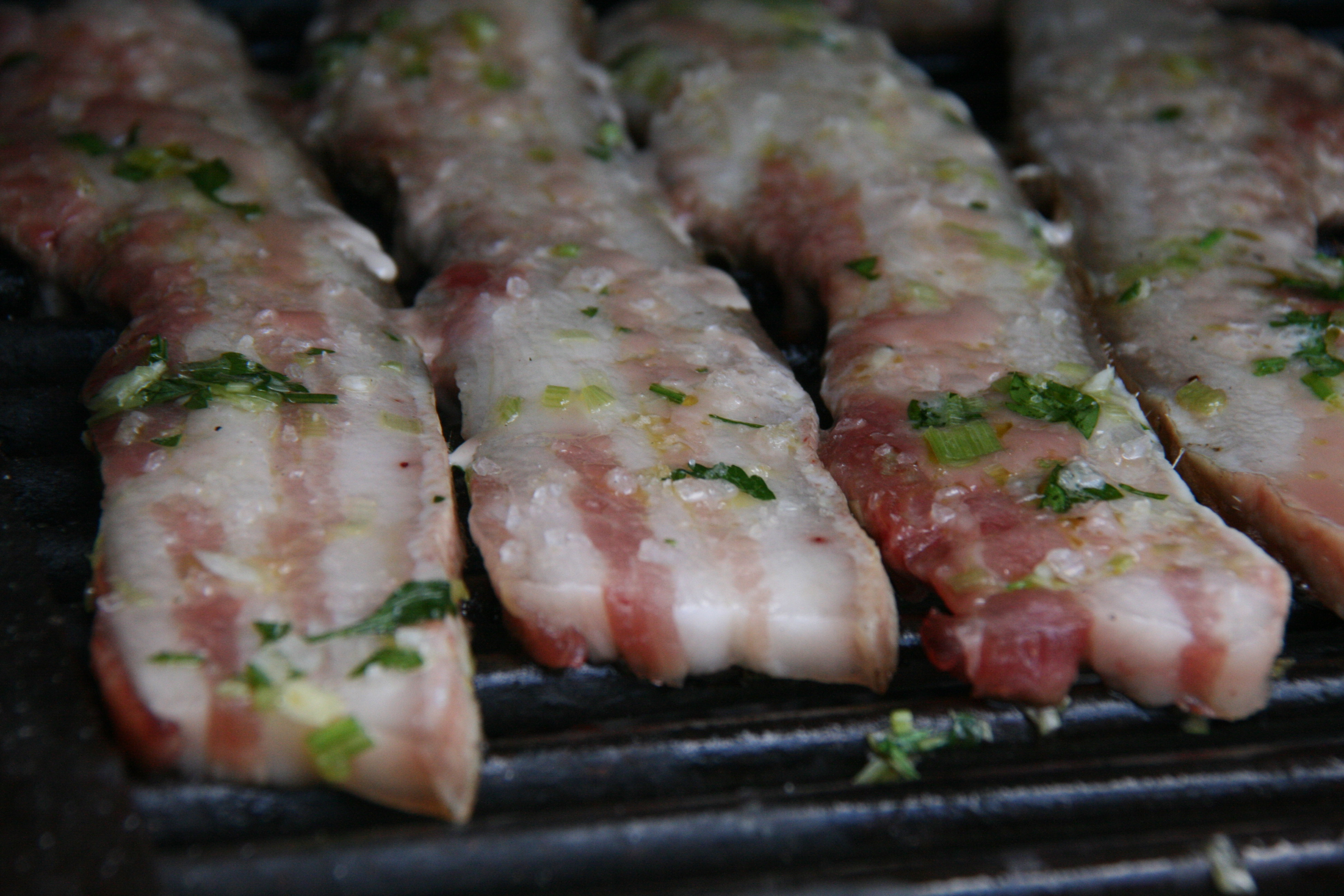 Panceta asada - España